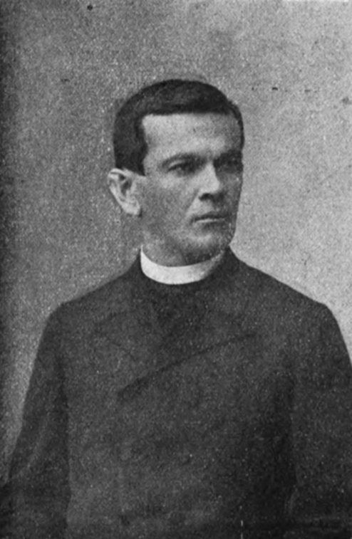 Hornjoserbsce: Mikławš Andricki (1871–1908); serbski duchowny, spisowaćel, publicist a přełožowar.